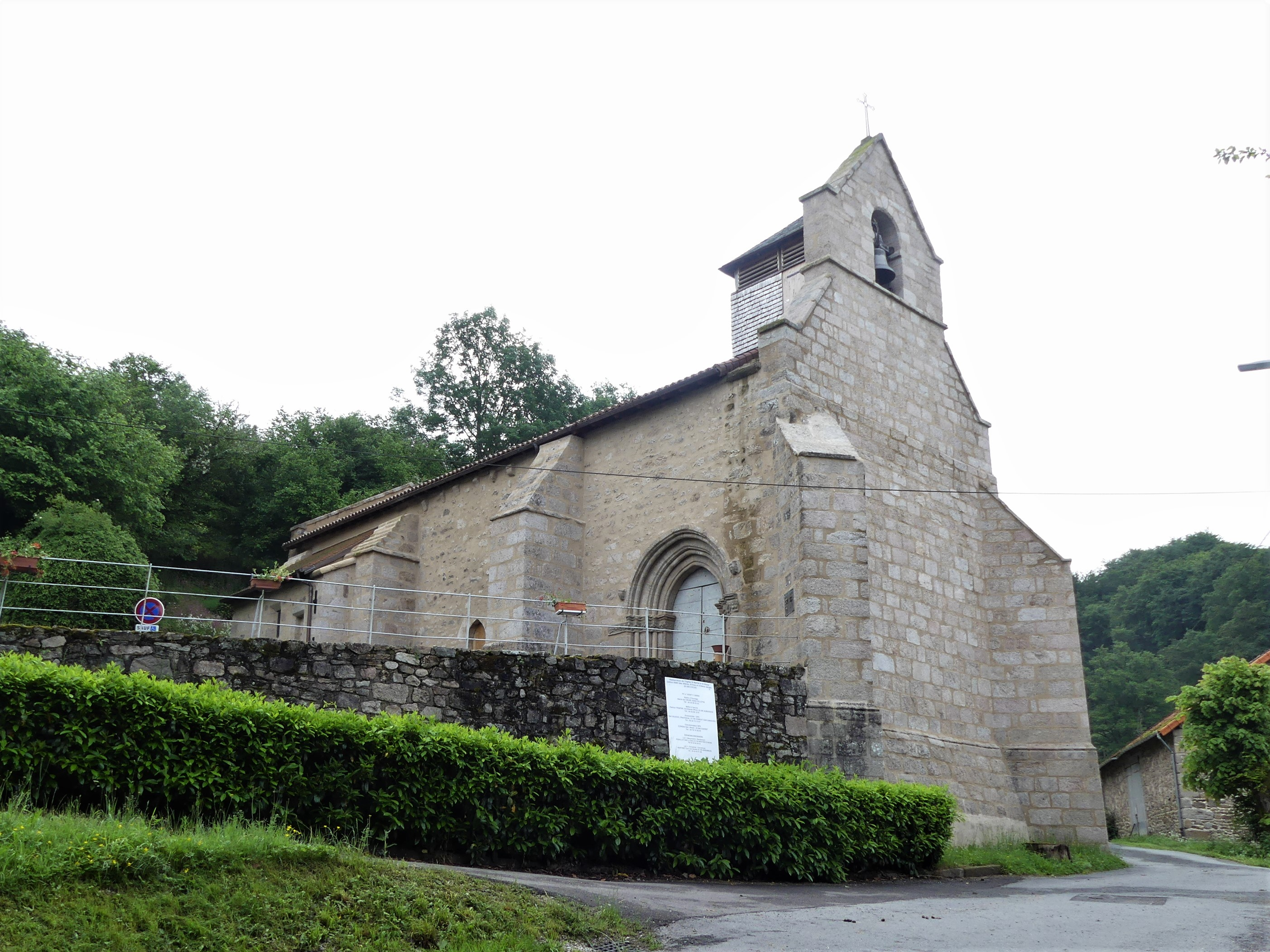 L'église Saint-Martial-et-Saint-Blaise de Croze, Creuse, France.